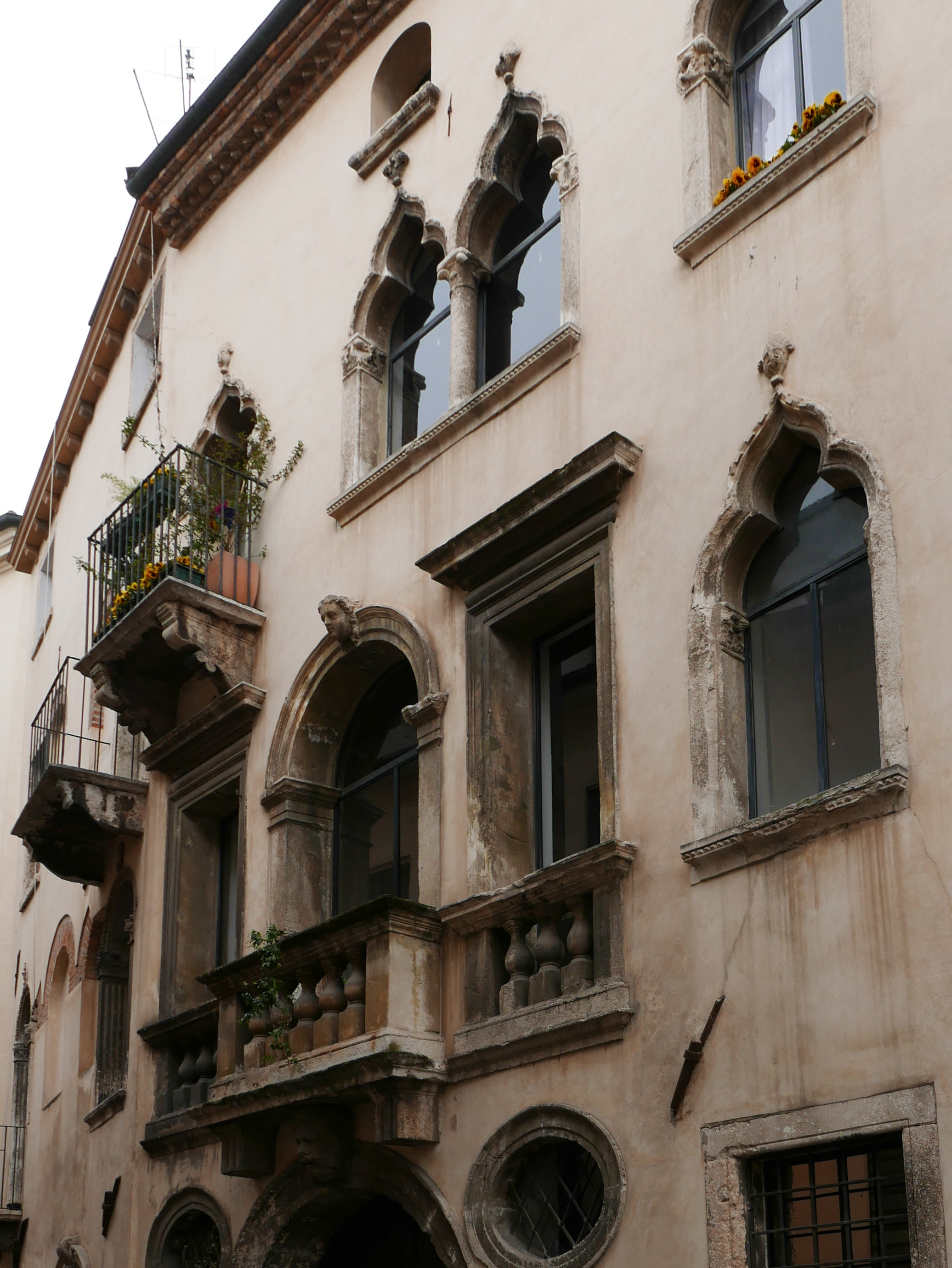 Dettaglio della facciata